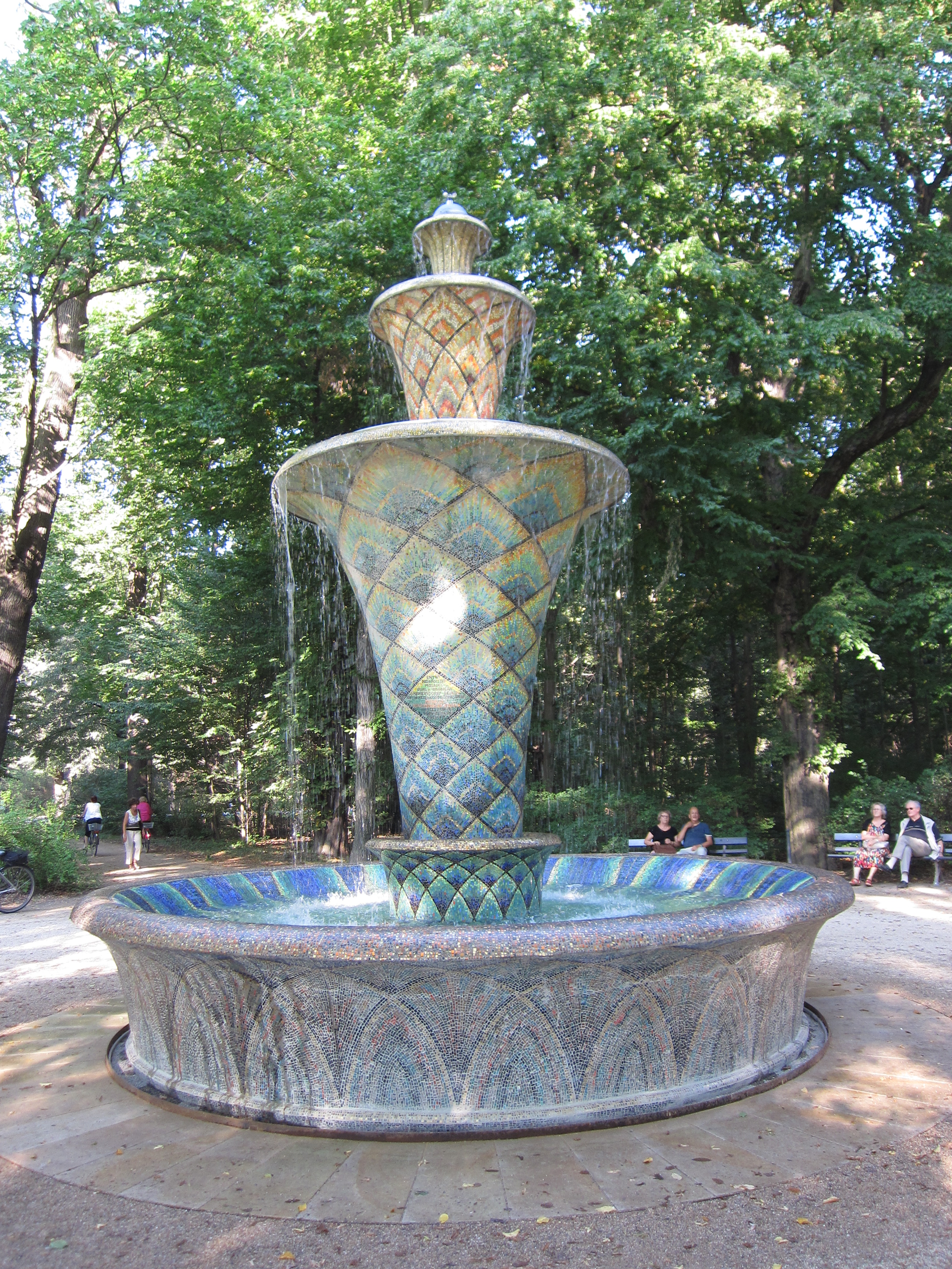 Der Mosaikbrunnen in Dresdner Großen Garten am Tag nach der Wiedereröffnung nach zweijähriger Sanierung